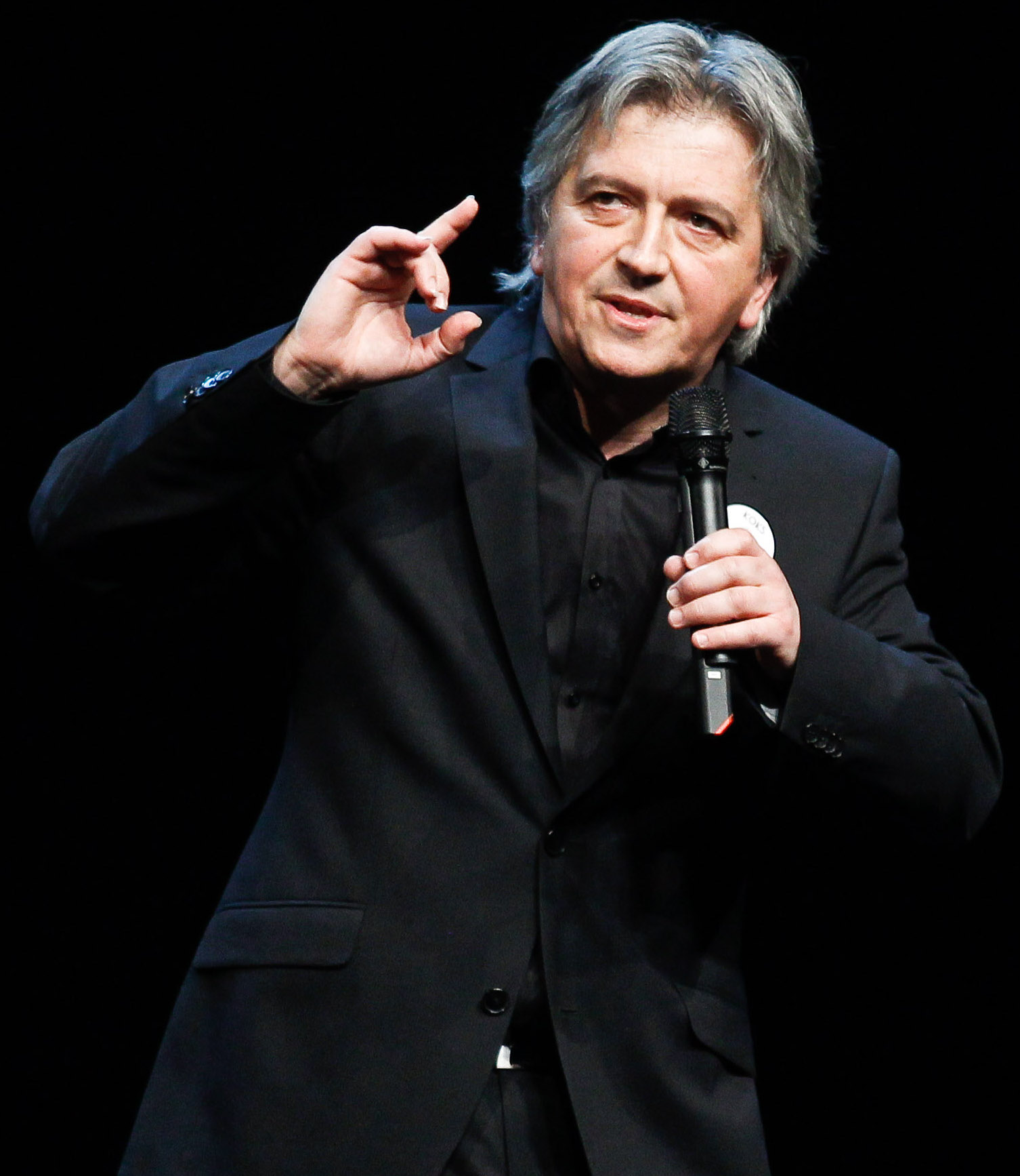 Državna proslava ob Prešernovem dnevu